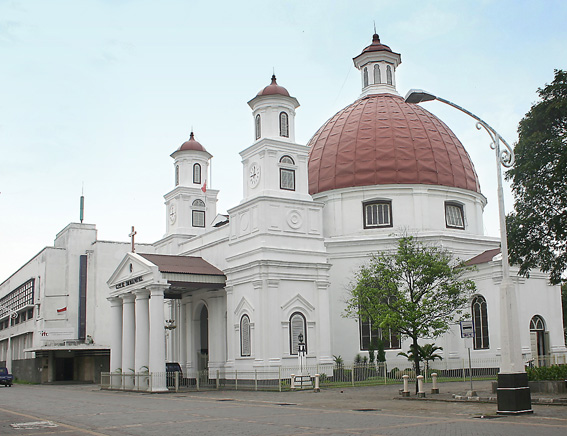 Blenduk Churck at Semarang.